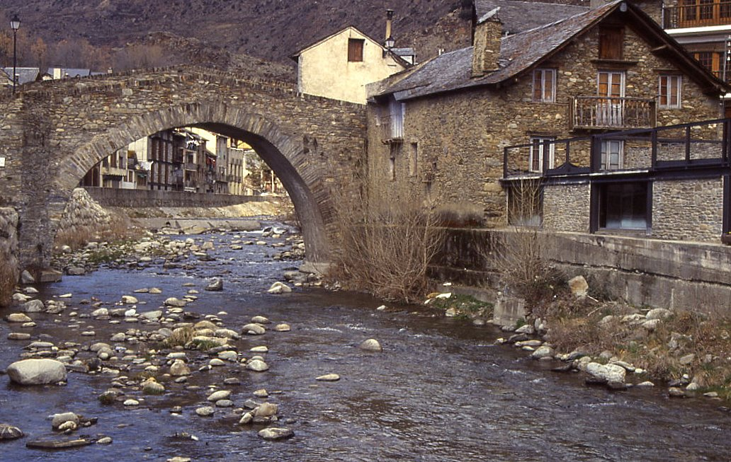 Vista de Esterri d'Aneu, en el norte de la provincia de Lérida. Original en diapositiva de 35 mm. tomada en febrero de 1995.